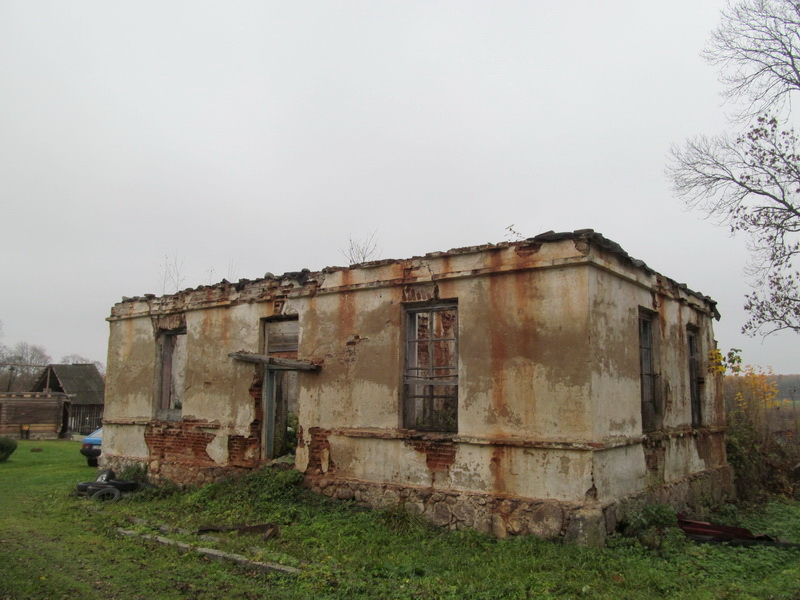 Гняздзілава. Рэшткі сядзібы